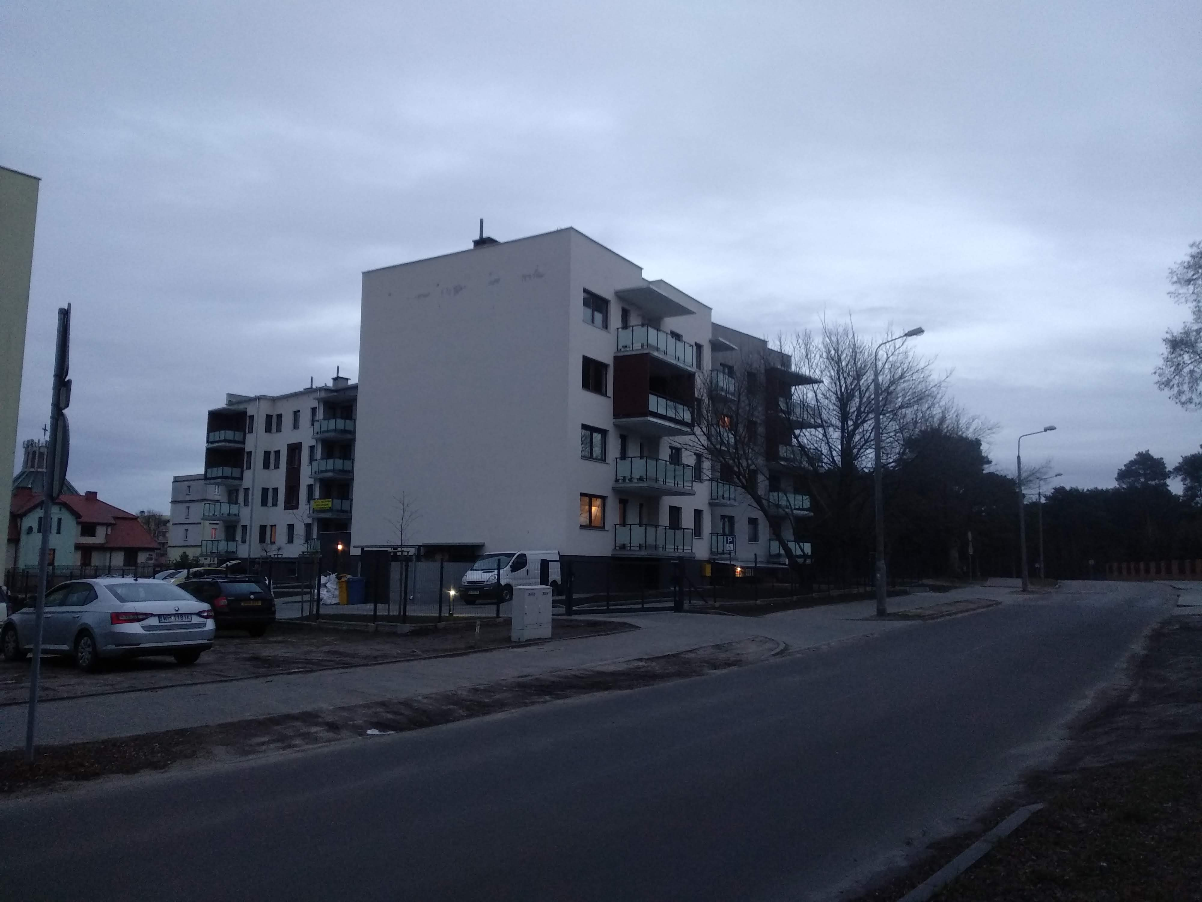 Budowa bloku przy ul. Leśnej (2020 r.)